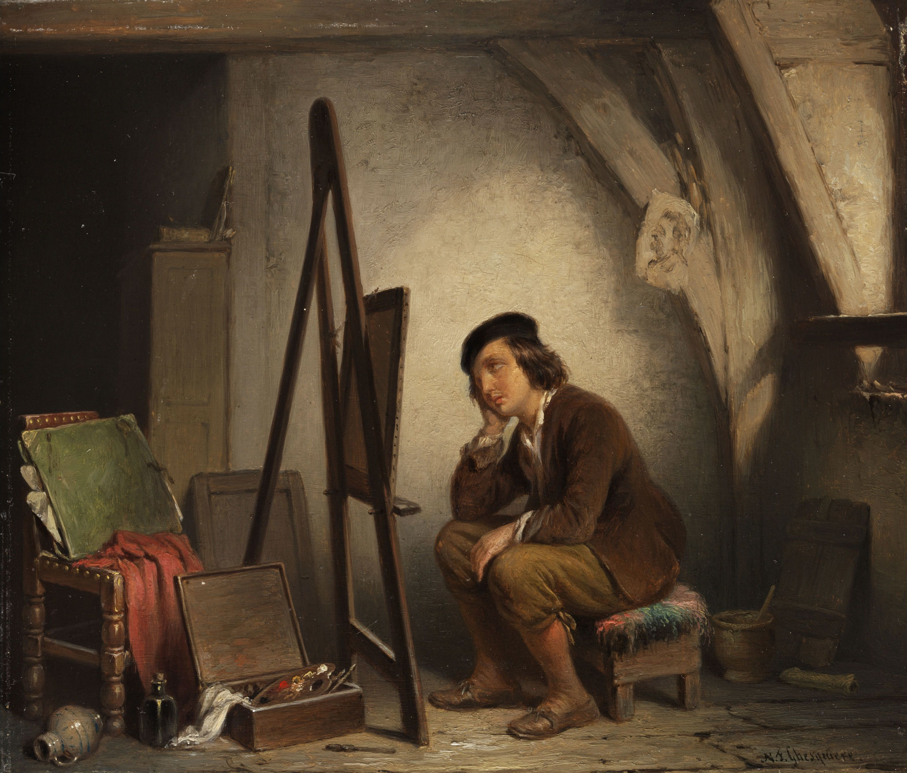 Der vor seiner Staffelei nachdenklich sinnende junge Maler. Öl auf Holz. 23,5 x 26,8 cm. Rechts unten signiert.